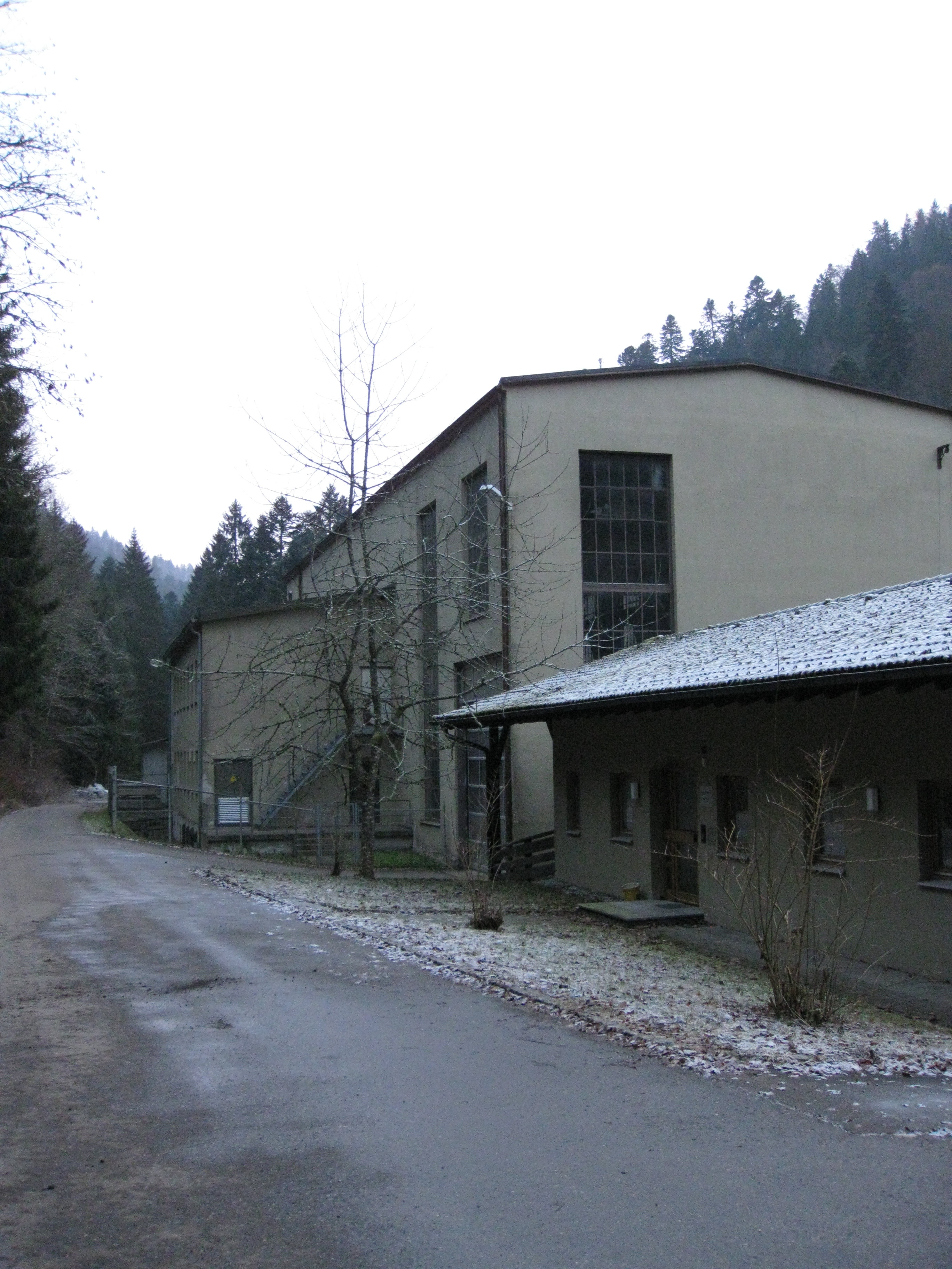 Maschinengebäude des ehemaligen Kraftwerks Eichholz